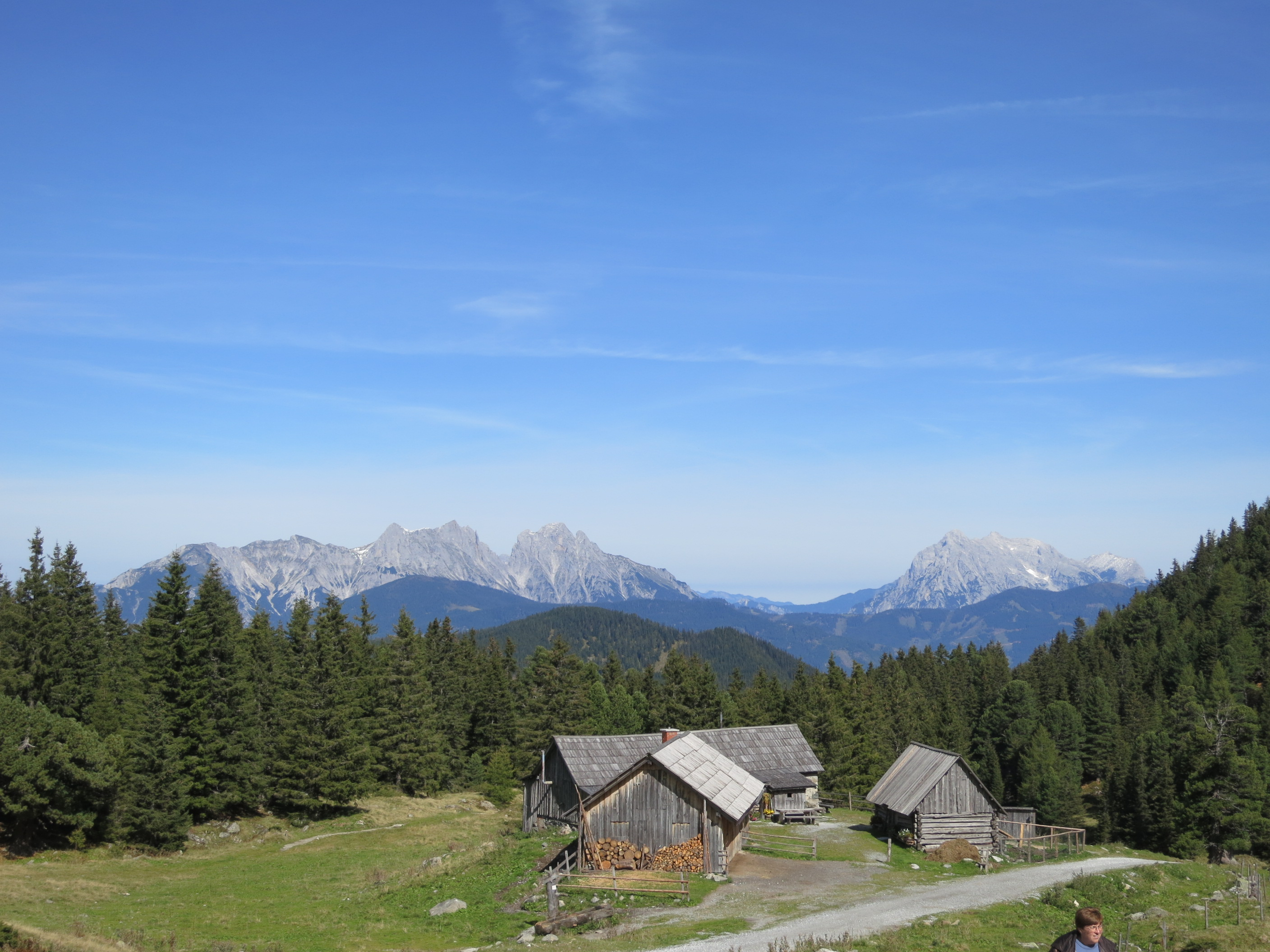 Scheibelalm mit Blick zum Nationalpark Gesäuse This media shows the Geschützter Landschaftsteil in Styria with the ID GLT_0172.